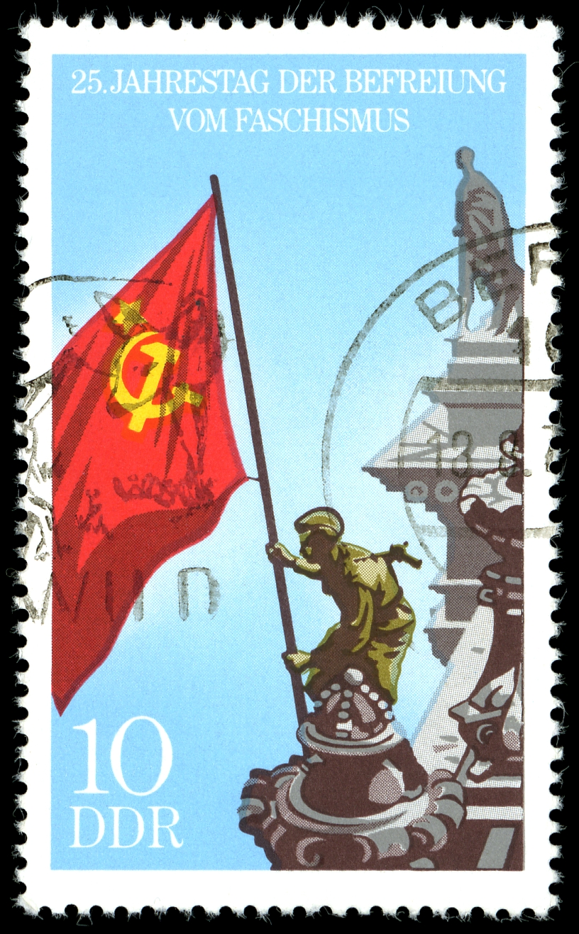 Bildbeschreibung: 25.Jahrestag der Befreiung vom FaschismusSoldat der Roten Armee hisst Flagge der Sowjetunion auf dem Reichstagsgebäude in Berlin Entwurf: Stauf Ausgabetag: 5. Mai 1970 Auflage: 5.000.000 MICHEL Nr.: 1569